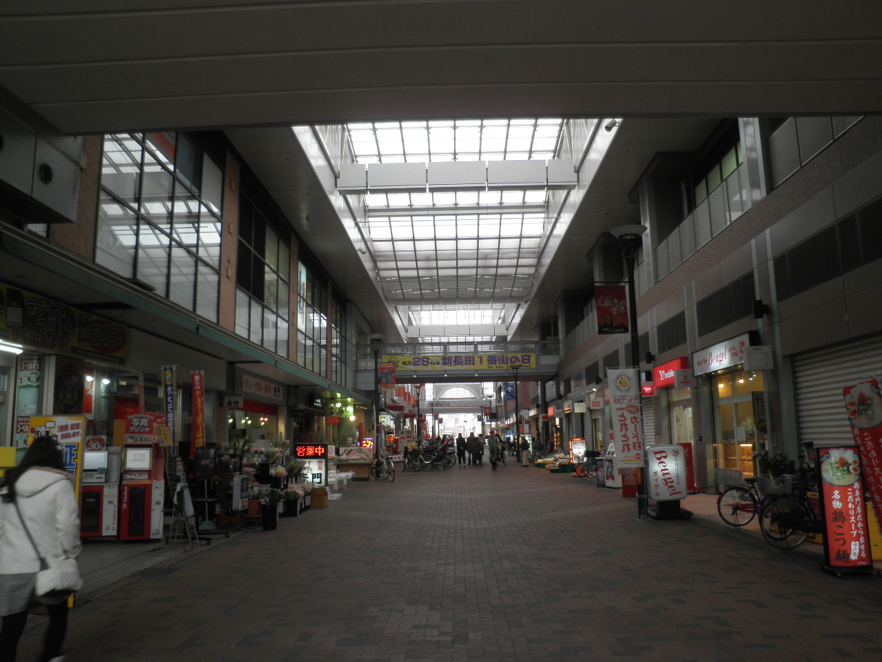 shin-nagata-1bangai